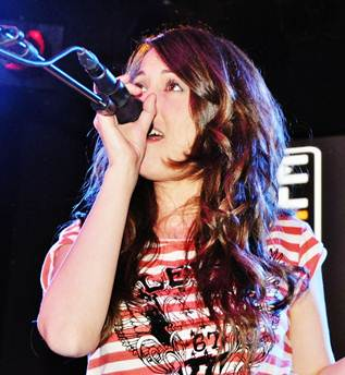 Mai Meneses live en Valencia